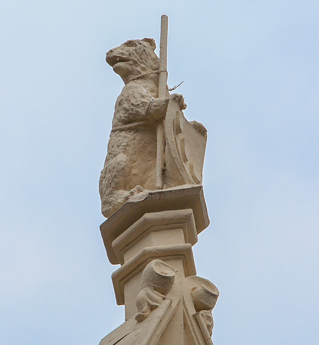 Denkmalgeschützter Putzbau (erbaut 1897; ehemaliges Hotel Westfalenhof), Drachenfelsstraße 30, Königswinter: Dachspitze (Bär mit Wetterfahne)